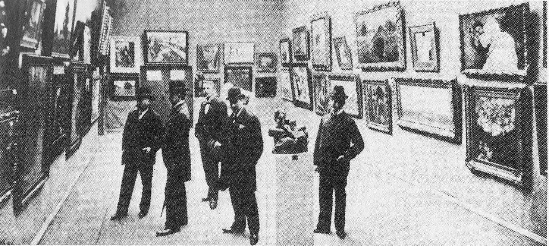 Der Vorstand der Berliner Sezession in der II. Sezessionsausstellung, 1900. v.l.n.r.: Oskar Frenzel, Franz Skarbina, Otto Heinrich Engel, Max Liebermann, Bruno Cassirer.